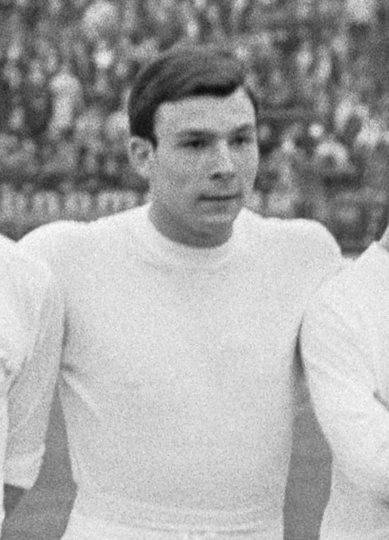 Real Madrid voor de Europacup I-finale tegen FK Partizan in het Heizelstadion, Brussel. Pedro de Felipe.